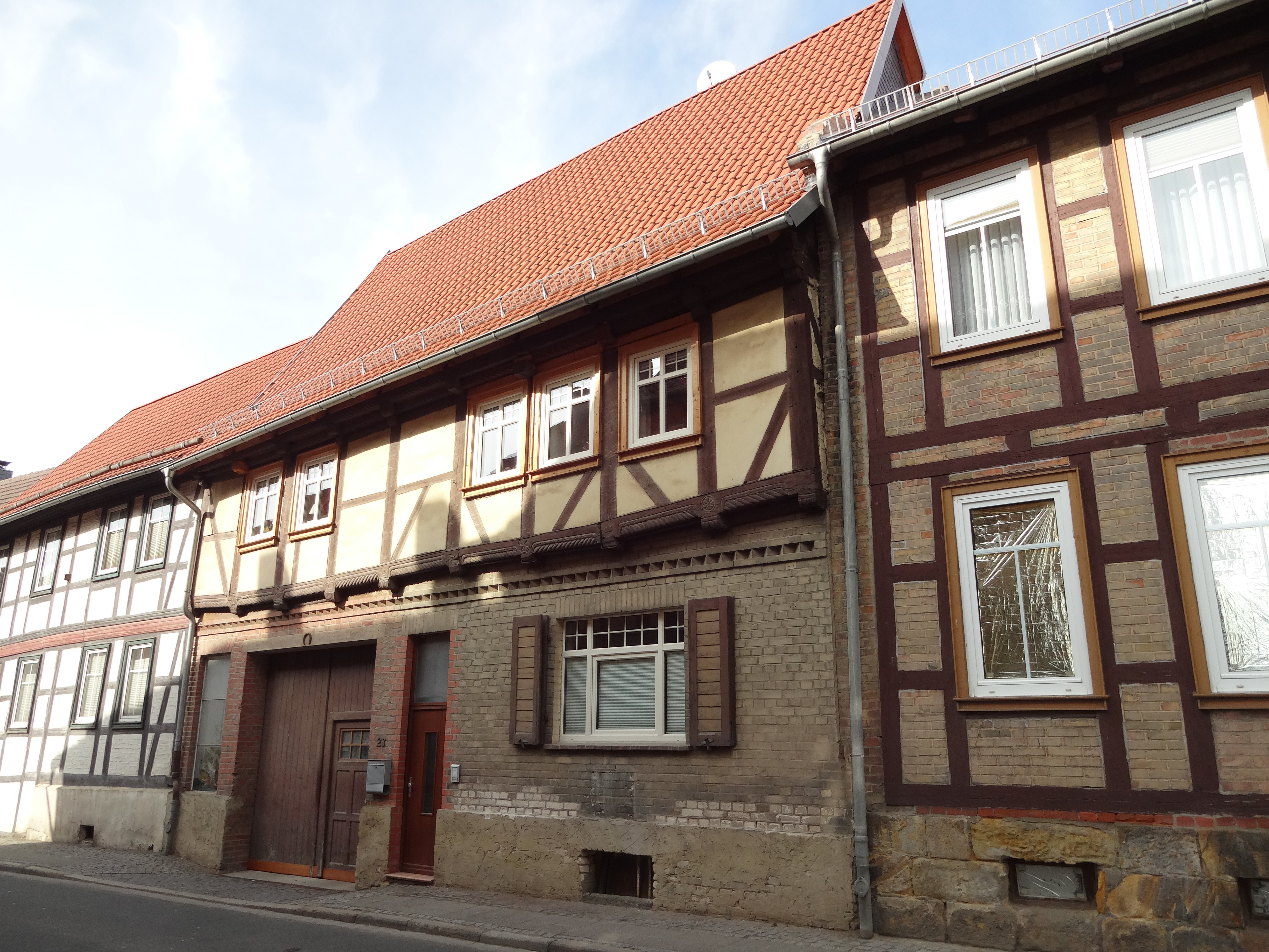 denkmalgeschütztes Fachwerkhaus in der Halberstädter Straße 23 in Derenburg, Ortsteil von Blankenburg (Harz)